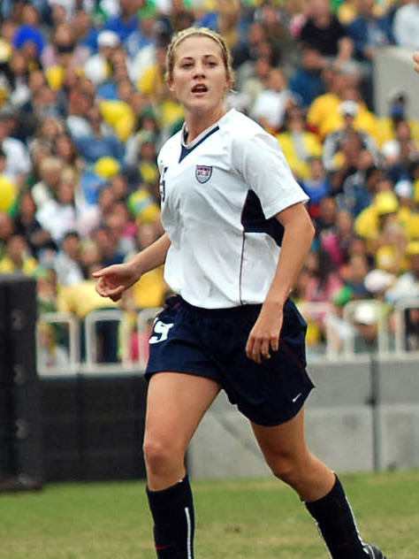 Rio de Janeiro - Equipe brasileira de futebol feminino ganha medalha de ouro nos jogos Pan-americanos do Rio de Janeiro, após vitória de 5 a 0 sobre a equipe dos Estados Unidos Foto: Wilson Dias/ABr